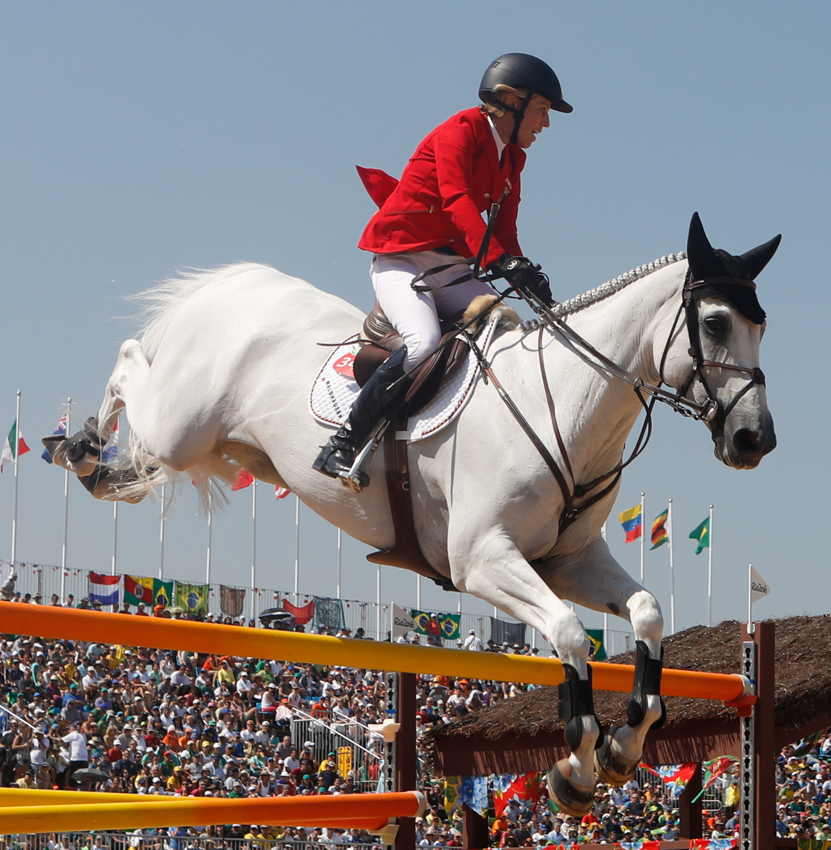 Rio de Janeiro - Competição de saltos do hipismo por equipes nos Jogos Olímpicos Rio 2016, em Deodoro. ( Fernando Frazão/Agência Brasil)